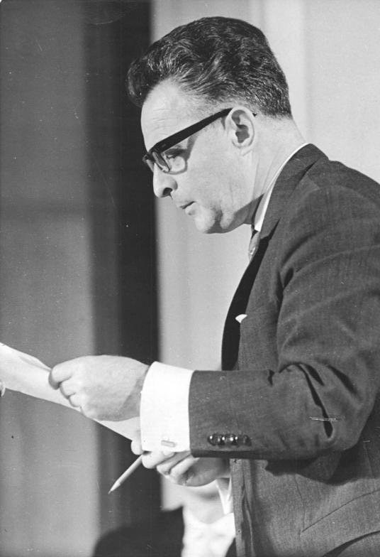 Oberstes Gericht, Globke-Prozess, Josef Streit Zentralbild Stöhr-15.7.1963 Zweite Verhandlungswoche gegen Globke begonnen. Vor dem 1. Strafsenat des Obersten Gerichts der DDR begann am 15. Juli 1963 in Berlin mit dem 7. Prozeßtag die zweite Verhandlungswoche in der Hauptverhandlung gegen Dr. Josef Maria Globke, Staatssekretär im Bonner Bundeskanzleramt. Die Verhandlungen werden mit der weiteren Beweisaufnahme zum Komplex der Germanisierungsverbrechen Globkes und der faschistischen Machthaber in Osteuropa und in Länder Westeuropas fortgesetzt. UBz: Generalstaatsanwalt Streit legt dem Gericht neue Dokumente vor, die Globkes Kumpan, Prof. Dr. Friedrich Karl Lialon, schwer belasten.